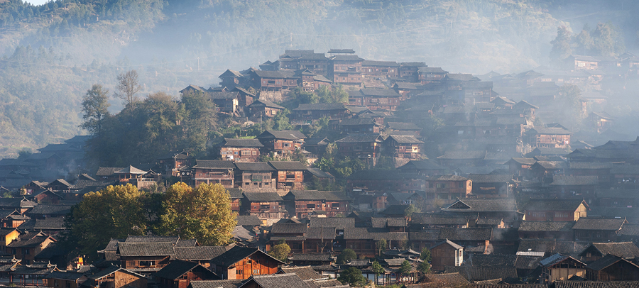 西江千戶苗寨風景